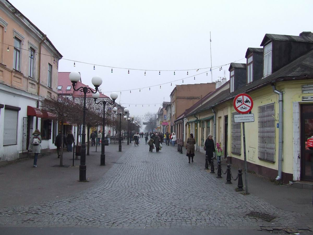 Biała Podlaska, ul. Brzeska – deptak.